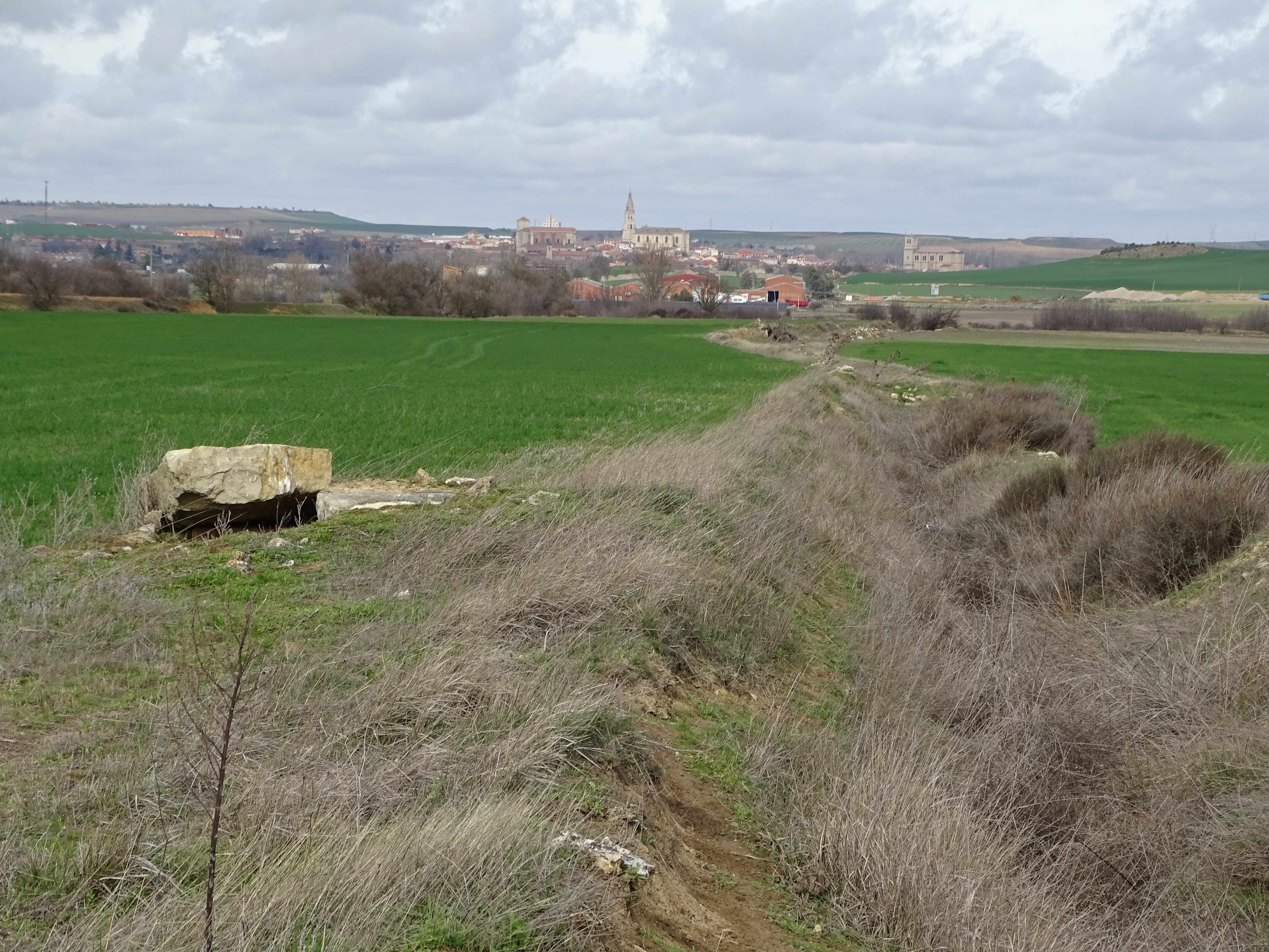 Monasterio de Valdescopezo en el término de Medina de Rioseco, (Valladolid, España), en los montes Torozos. Registro de la traída de aguas desde la fuente de la Samaritana. La conducción llegaba hasta el convento de Clarisas de Rioseco. Al fondo la ciudad de Medina de Rioseco.